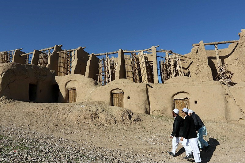 آسیاب های نشتیفان شهرستان خواف، روستای نشتیفان قرار دارد